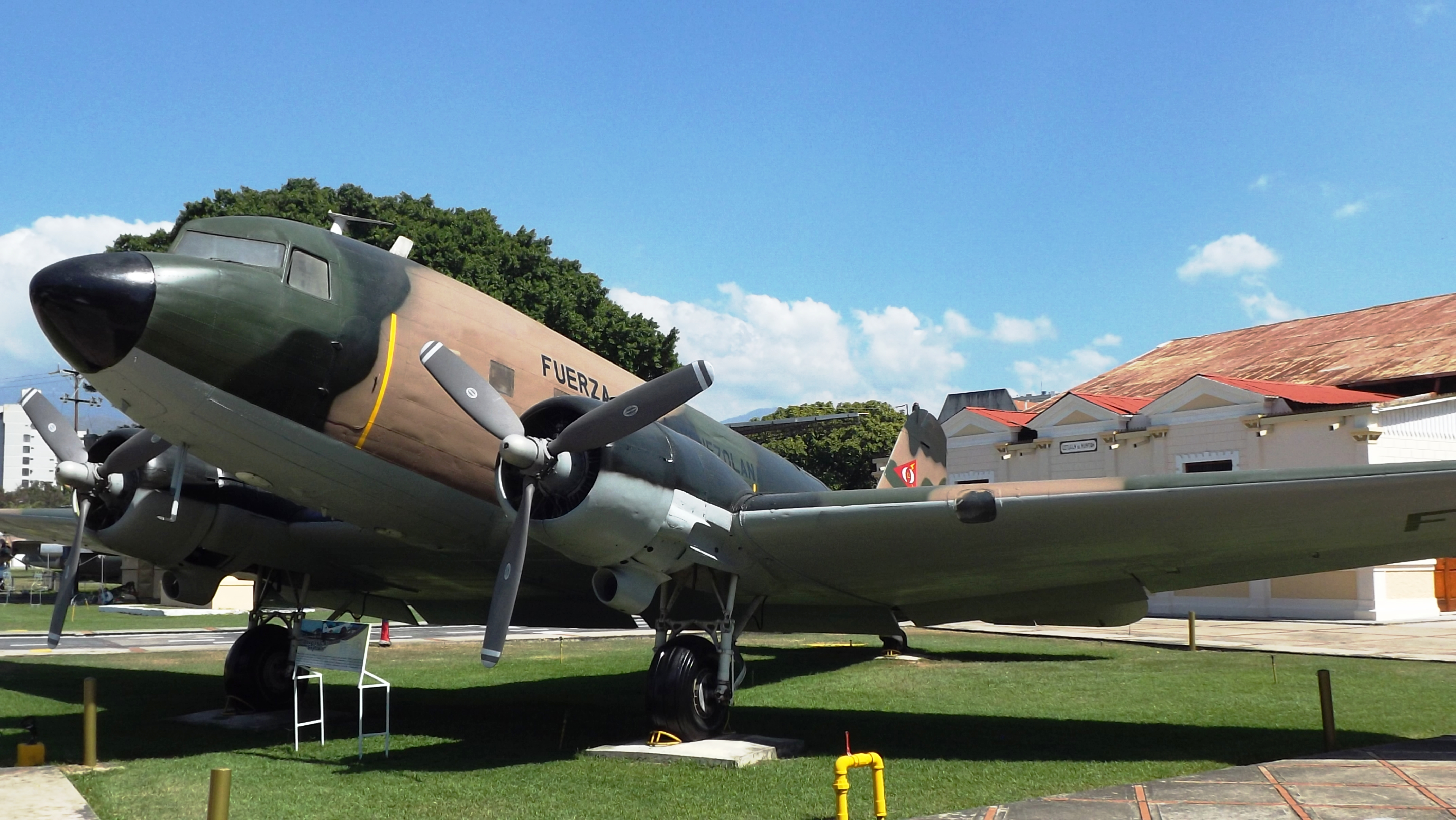 1840 Douglas DC-3 (C-47A Skytrain) de la Fuerza Aérea de Venezuela exhibido en el Museo Aeronáutico Luis Hernán Paredes de Maracay - Venezuela